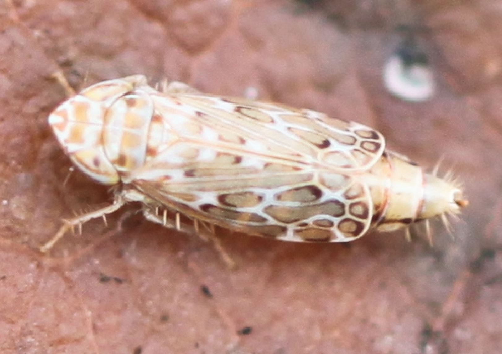 Jassargus cf. obtusivalvis am 5. Dezember 2018 in Walldorf/Baden